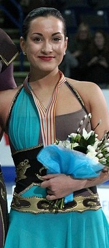 Ксения Столбова и Фёдор Климов с бронзовыми медалями чемпионата Европы по фигурному катанию 2012